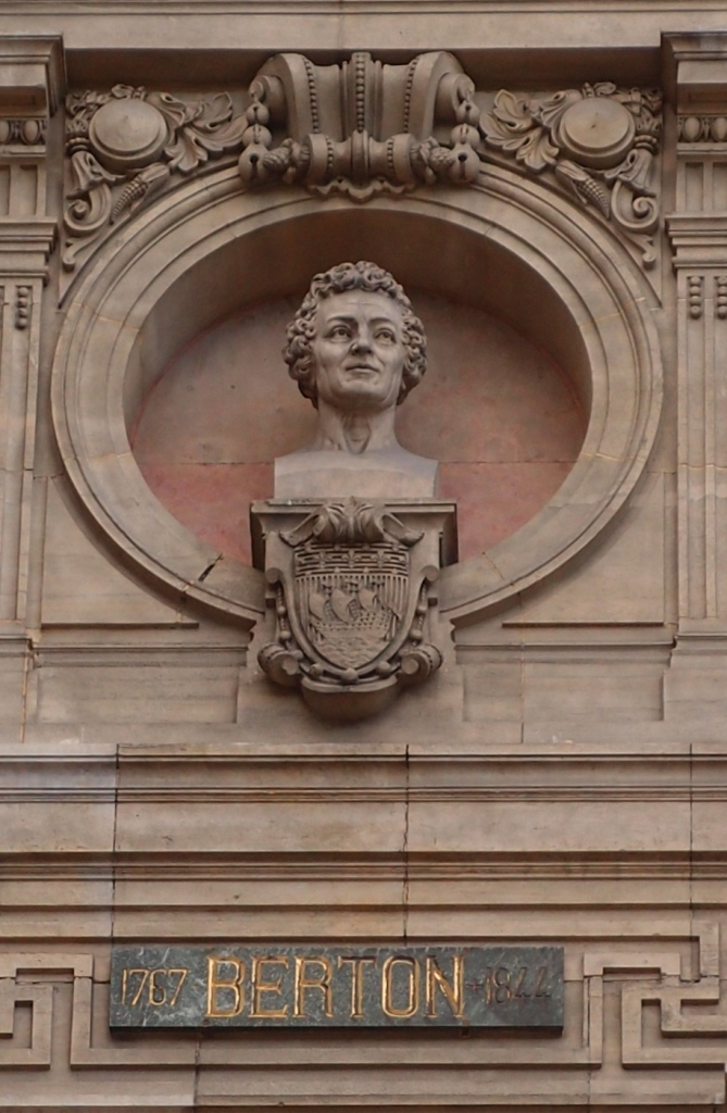 Büste des Komponisten Henri Montan Berton (1767-1844) an der Opéra Garnier in Paris